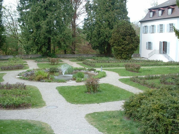 Laupheim, Castle Grosslaupheim, rosegarden